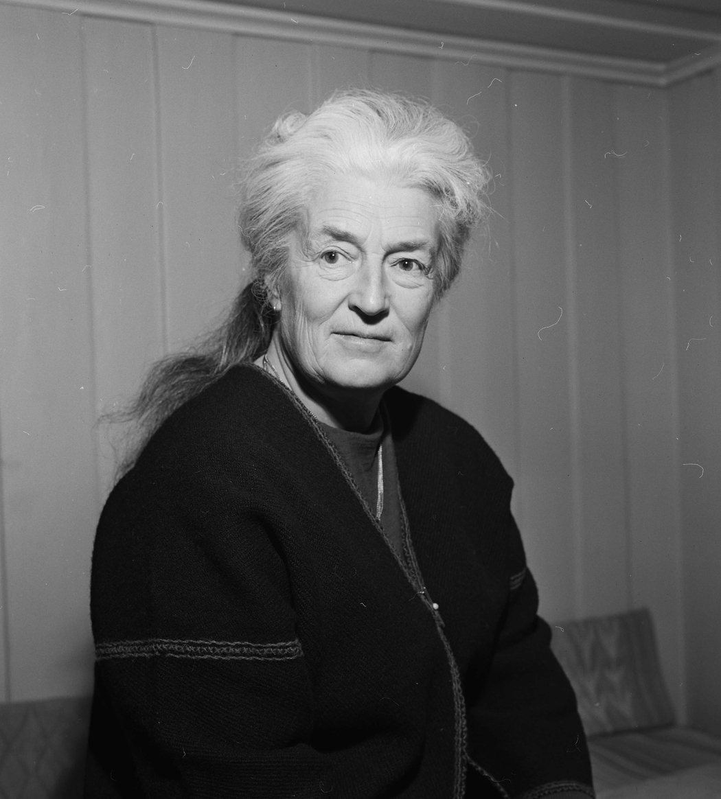 Sigrun Karoline Matina Berg (født 18. mai 1901 i Oslo, død 18. mai 1982) var en norsk kunsthåndverker, vever og tekstildesigner.